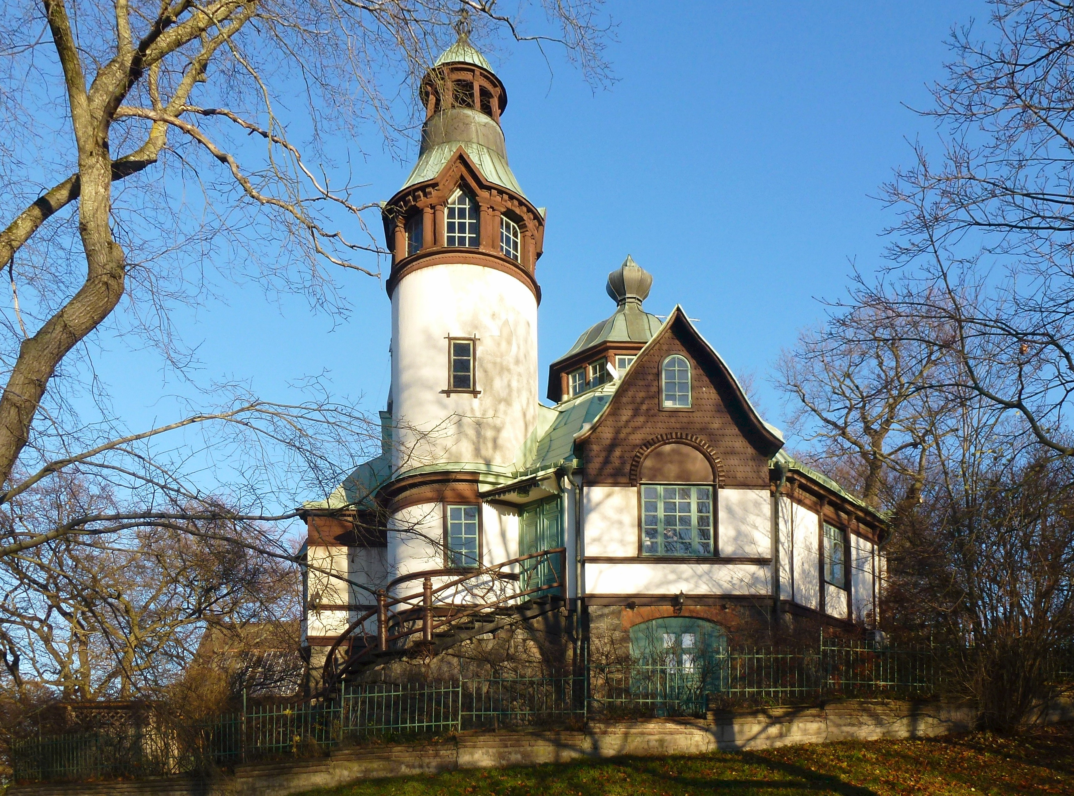 Jägarhyddan, Södra Djurgåprden